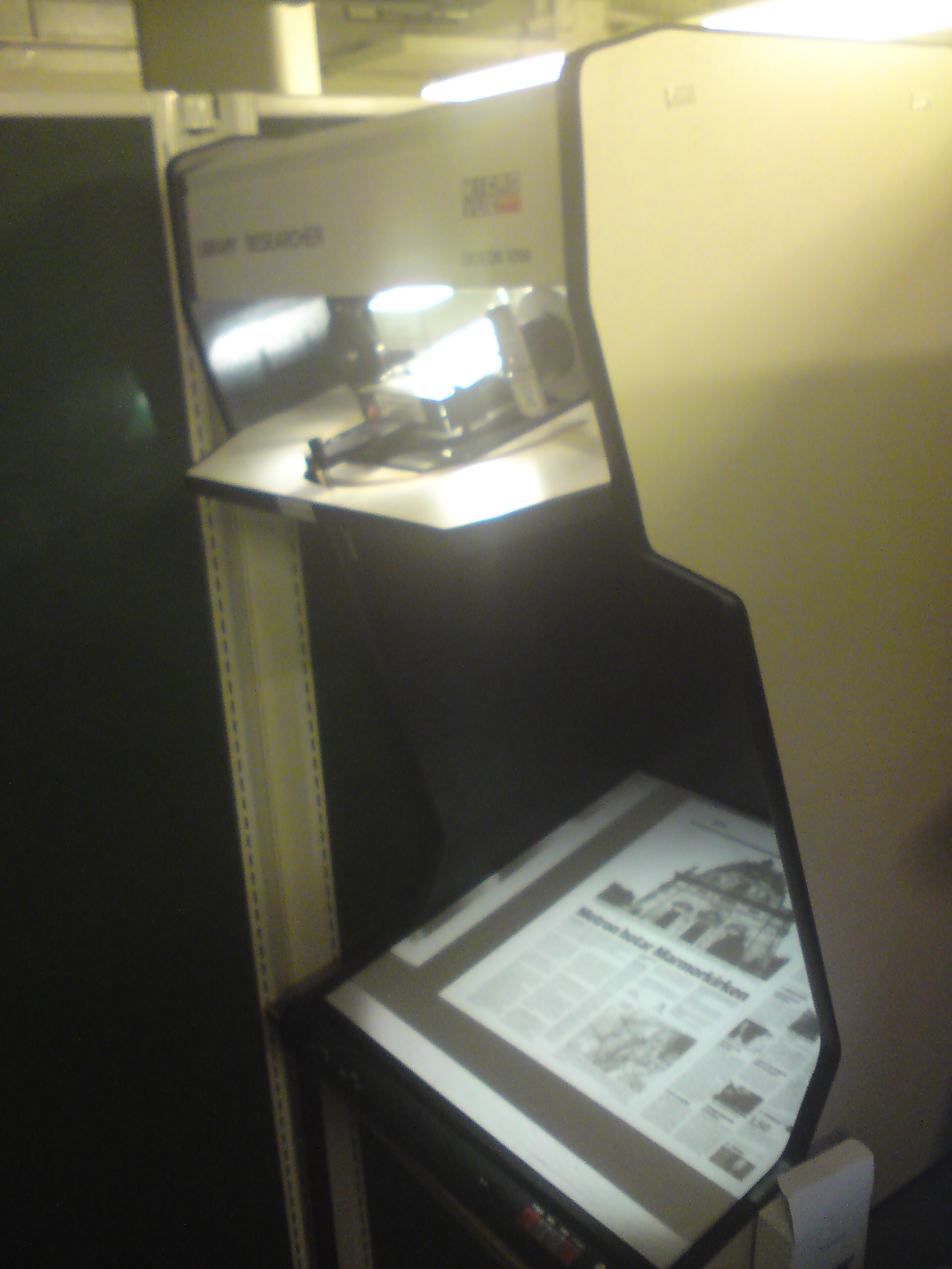 Mikrofilmsläsare